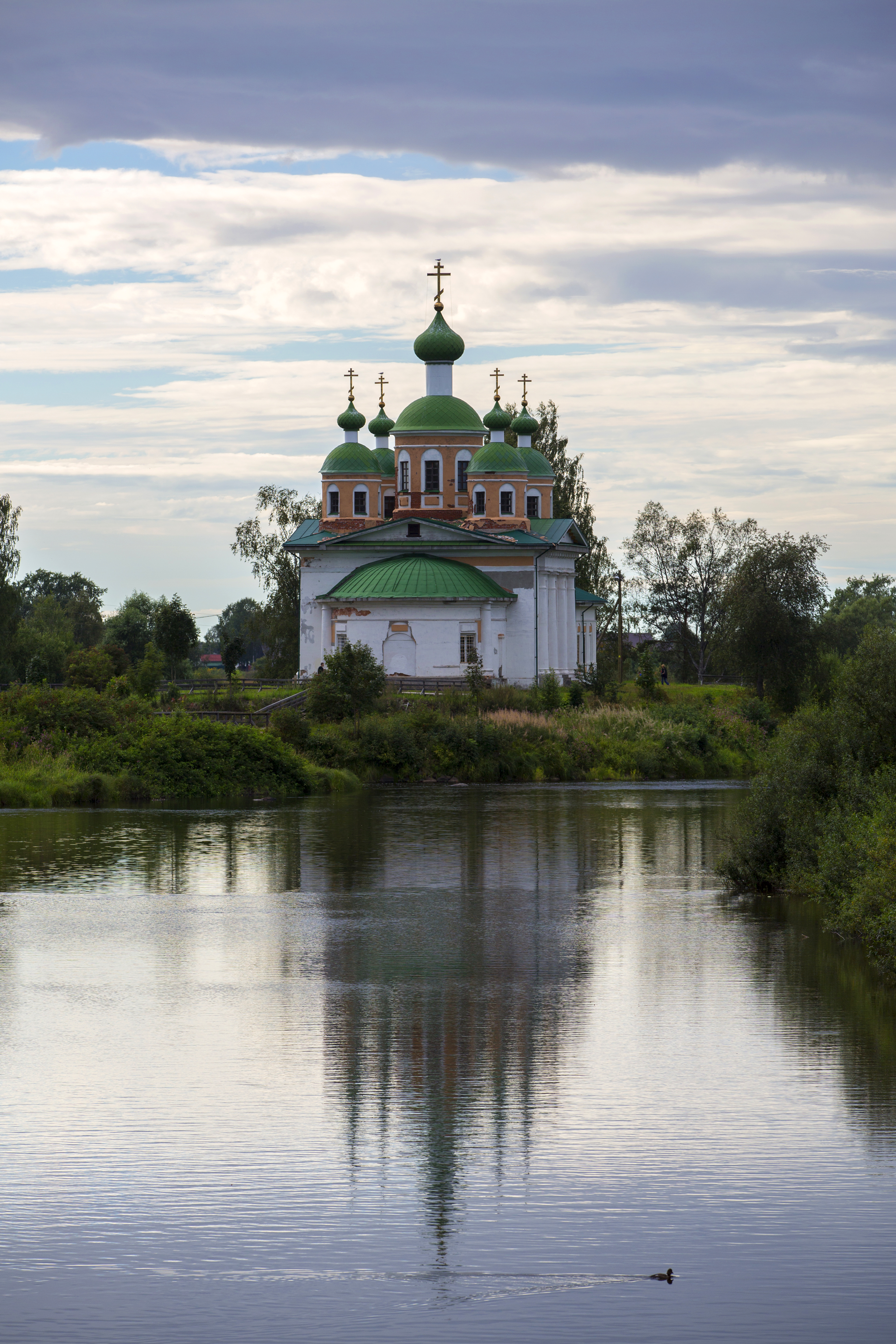 Церковь Смоленской иконы Божией Матери: остров Мариам, Олонец, Олонецкий район, Карелия